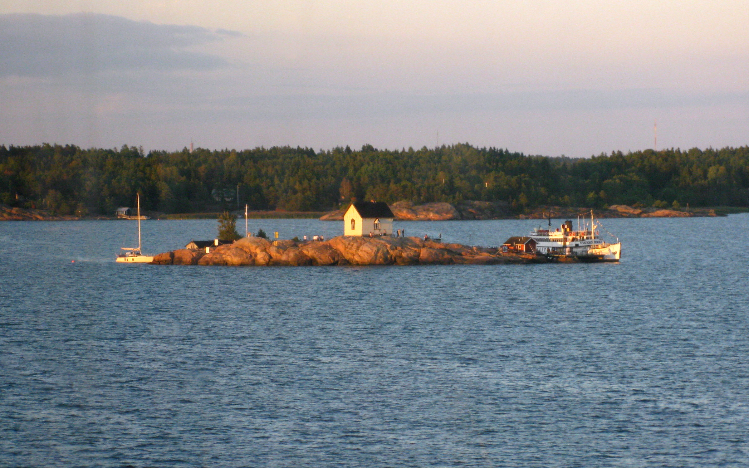 Loistokari, Airisto, Åbolands skärgård.